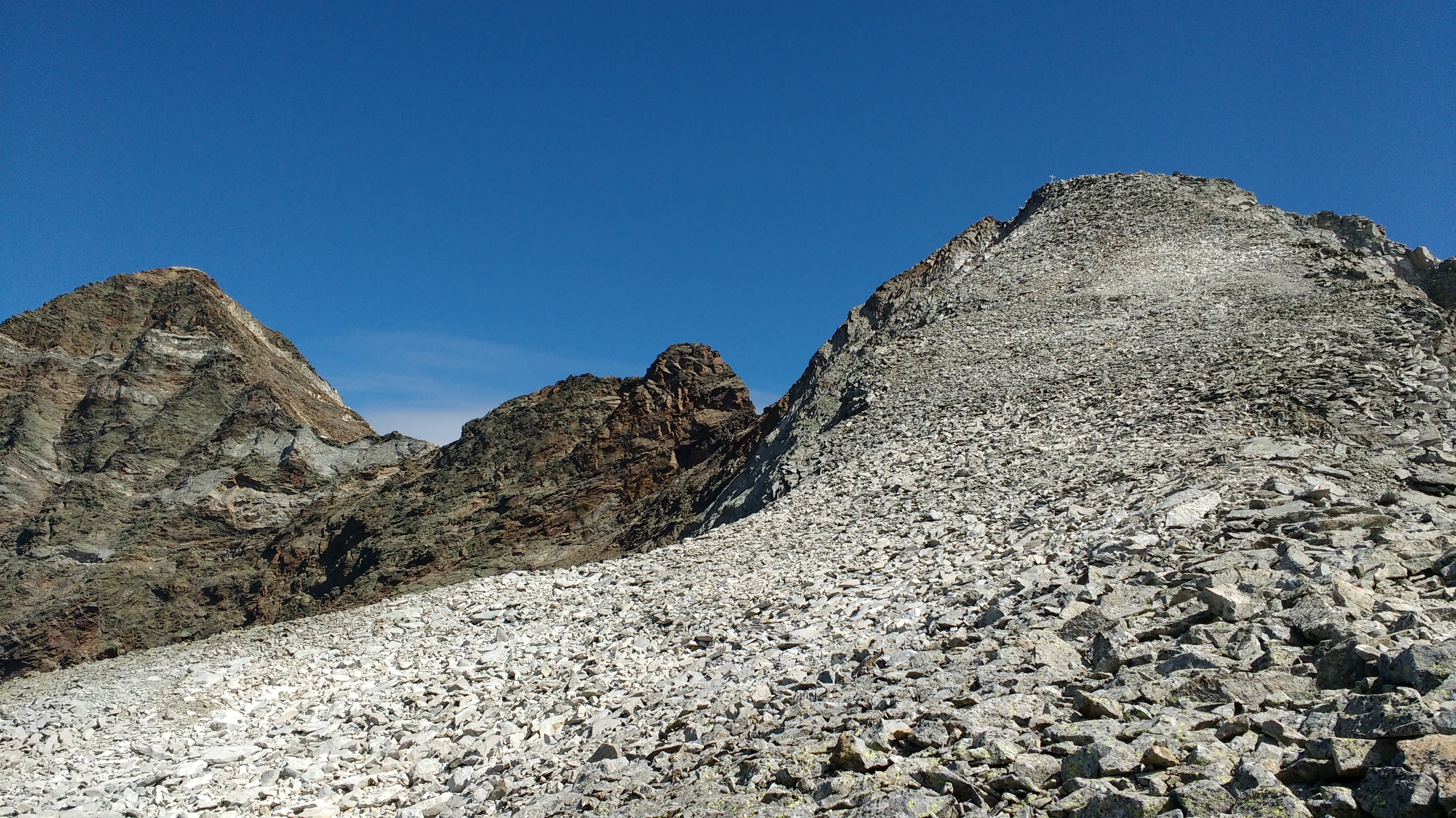 Fernerköpfl und Schneebiger Nock beim Aufstieg von der Rieserfernerhütte